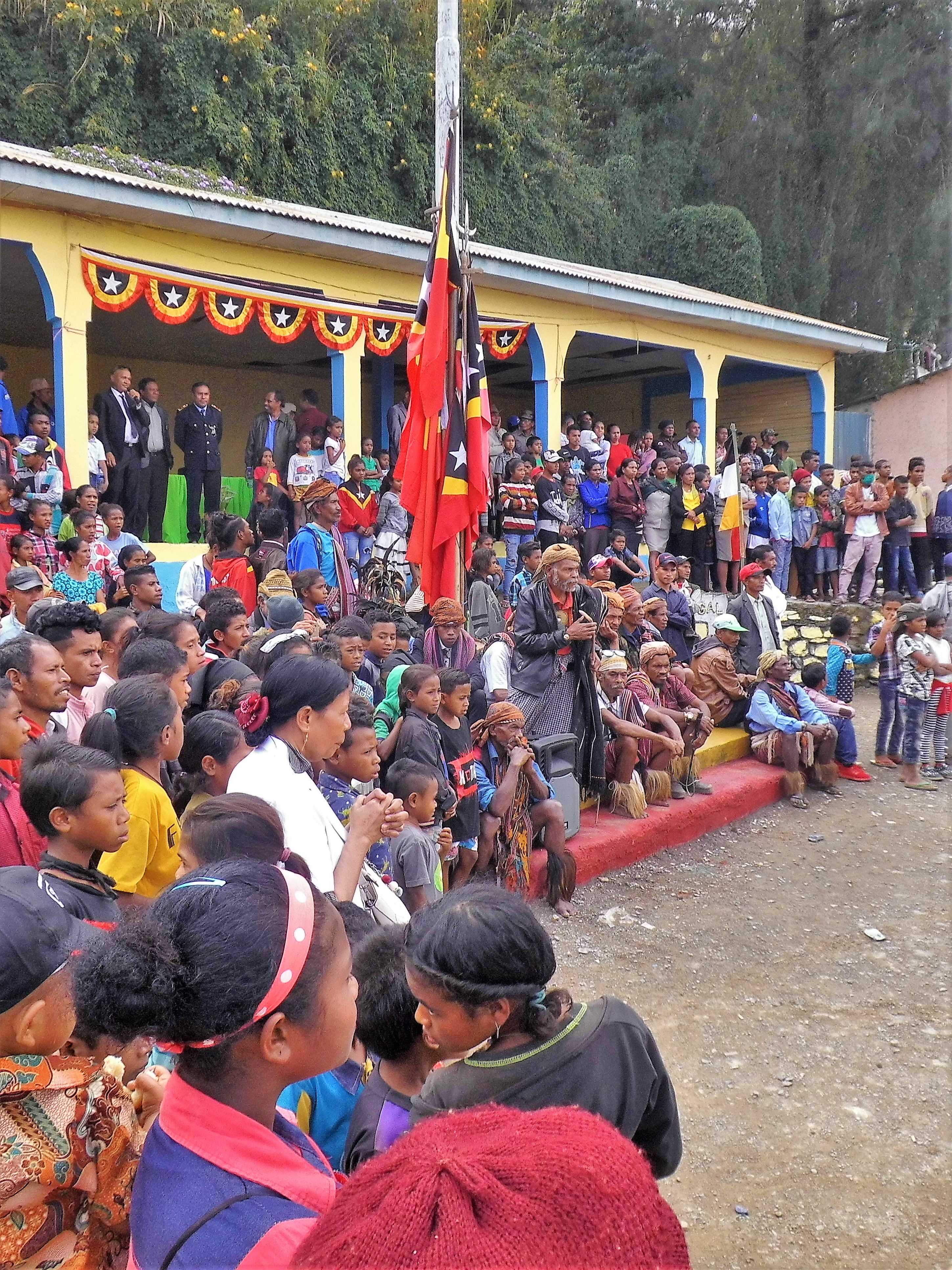 Maubisse